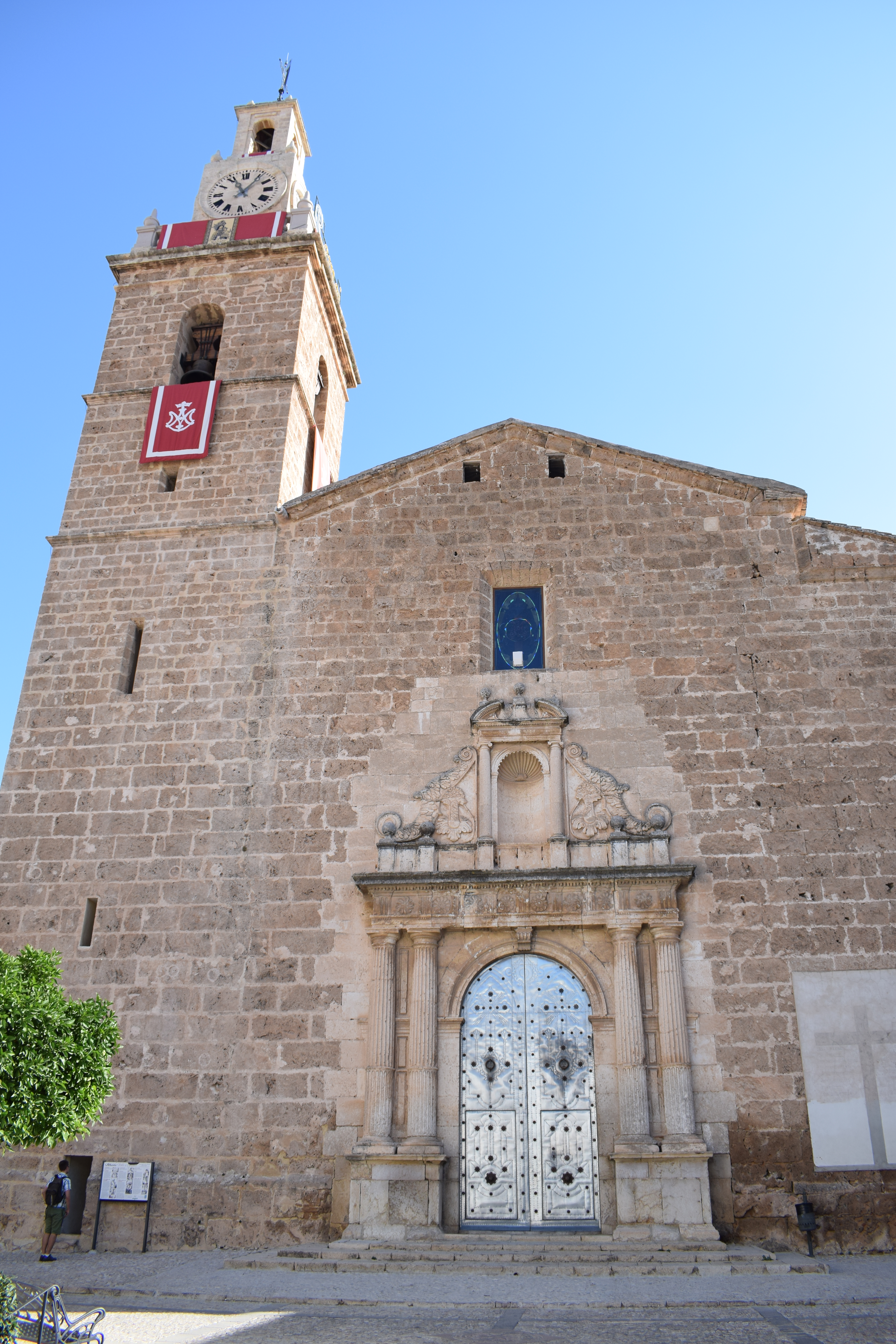 Albaida.